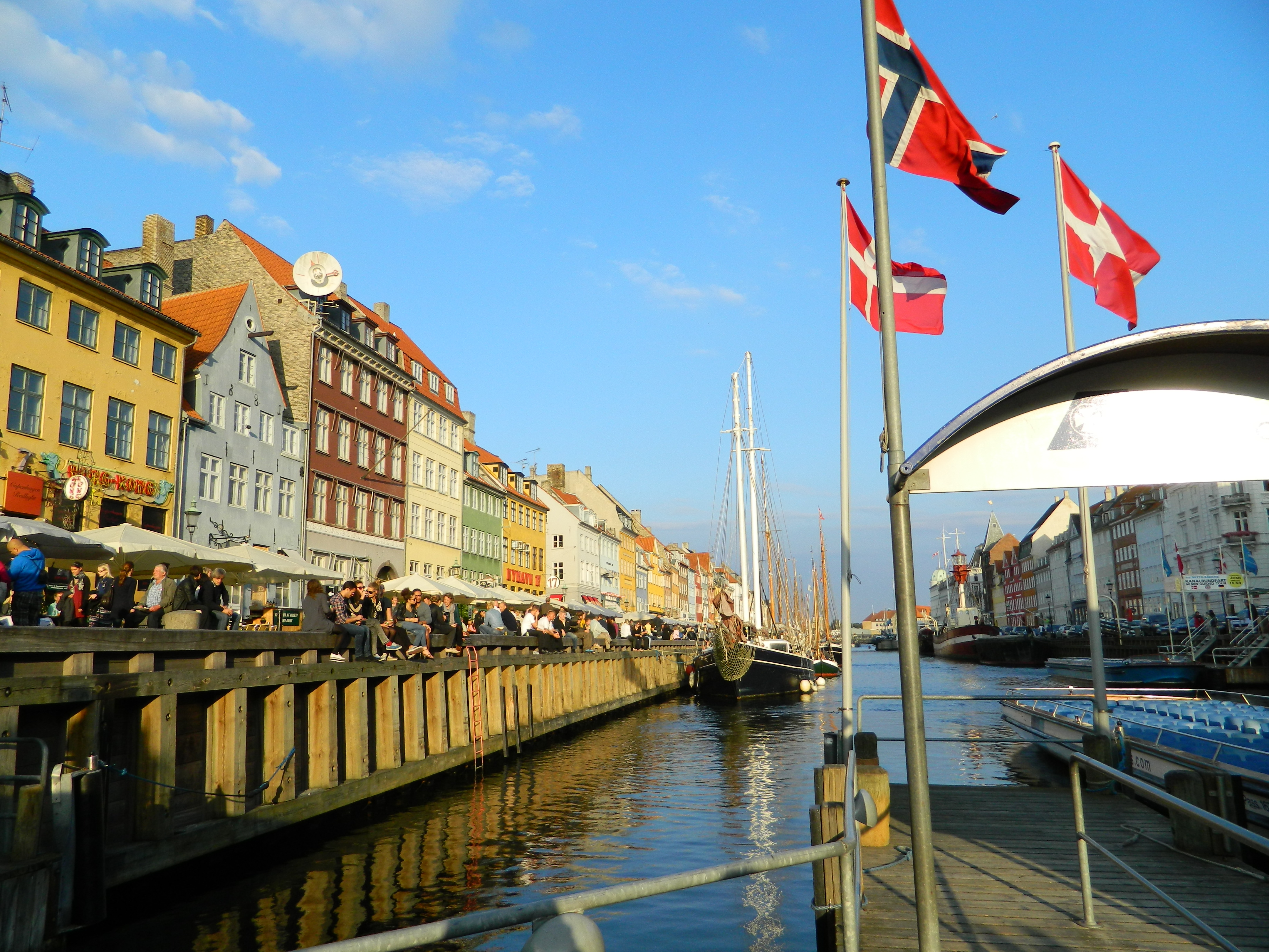 Nyhavn, Copenhagen